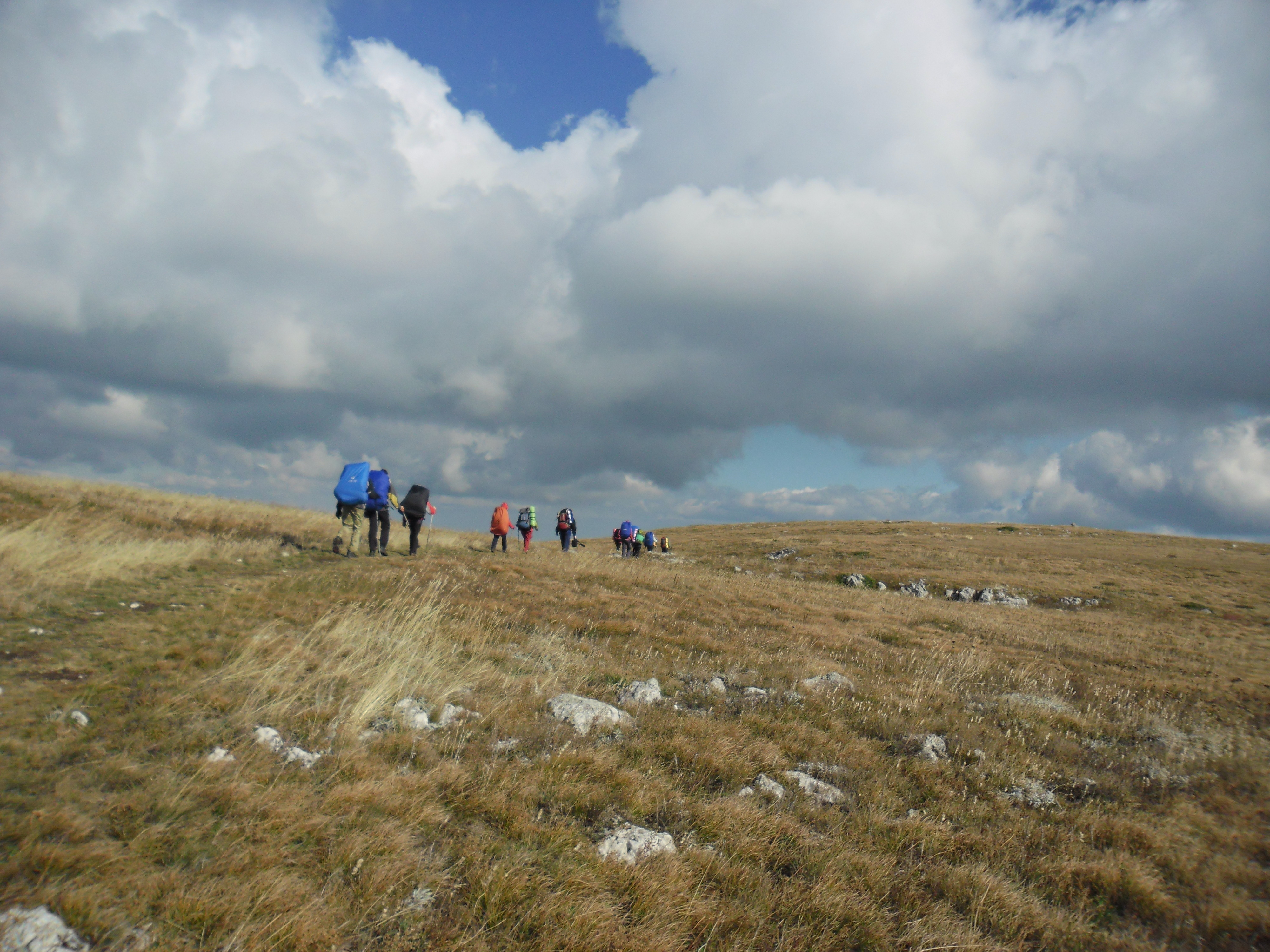 Туристи._Чатир-Даг: Фото